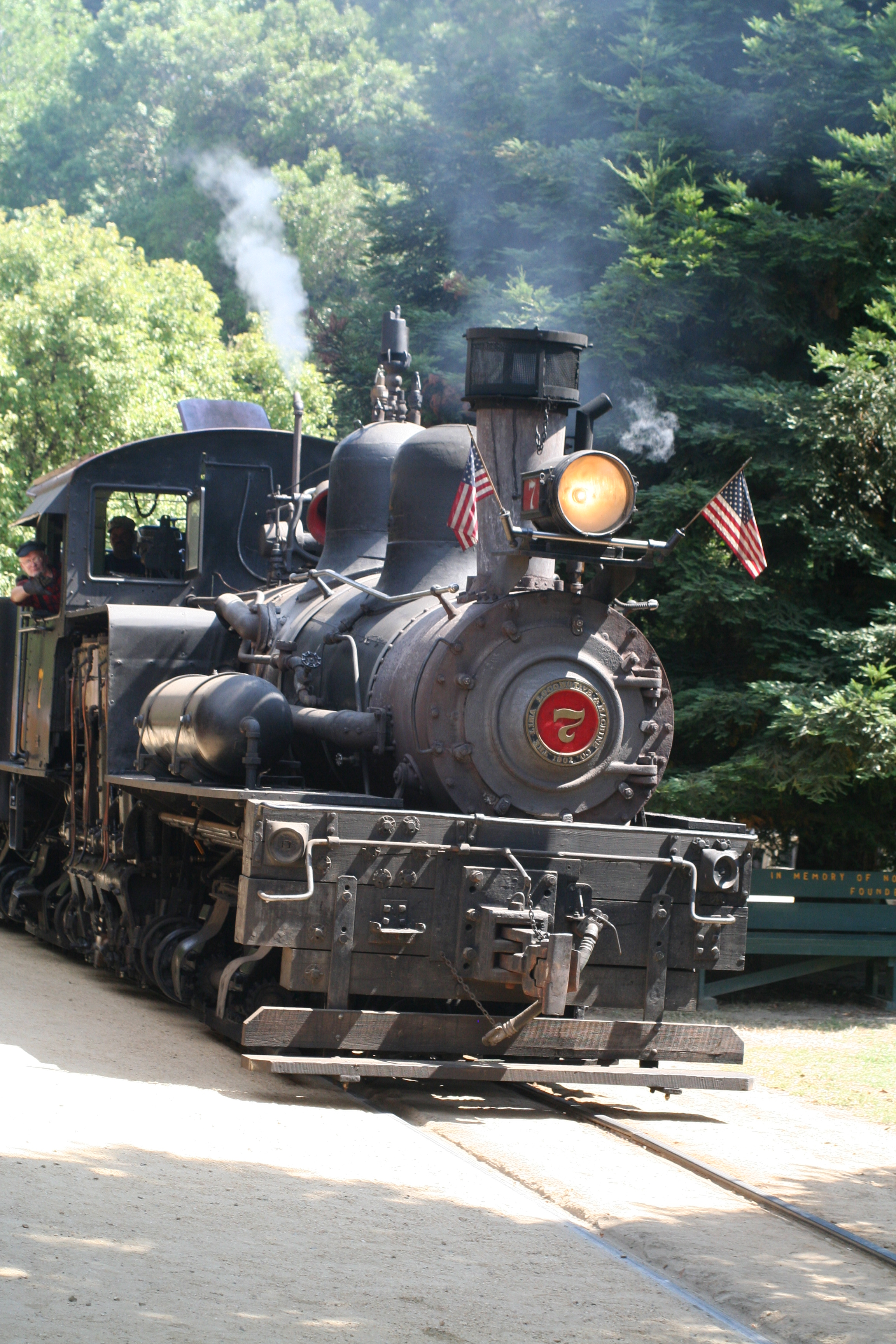 Locomotive No 7 - 'Sonora' - Roaring Camp Railroad - Santa Cruz, CA